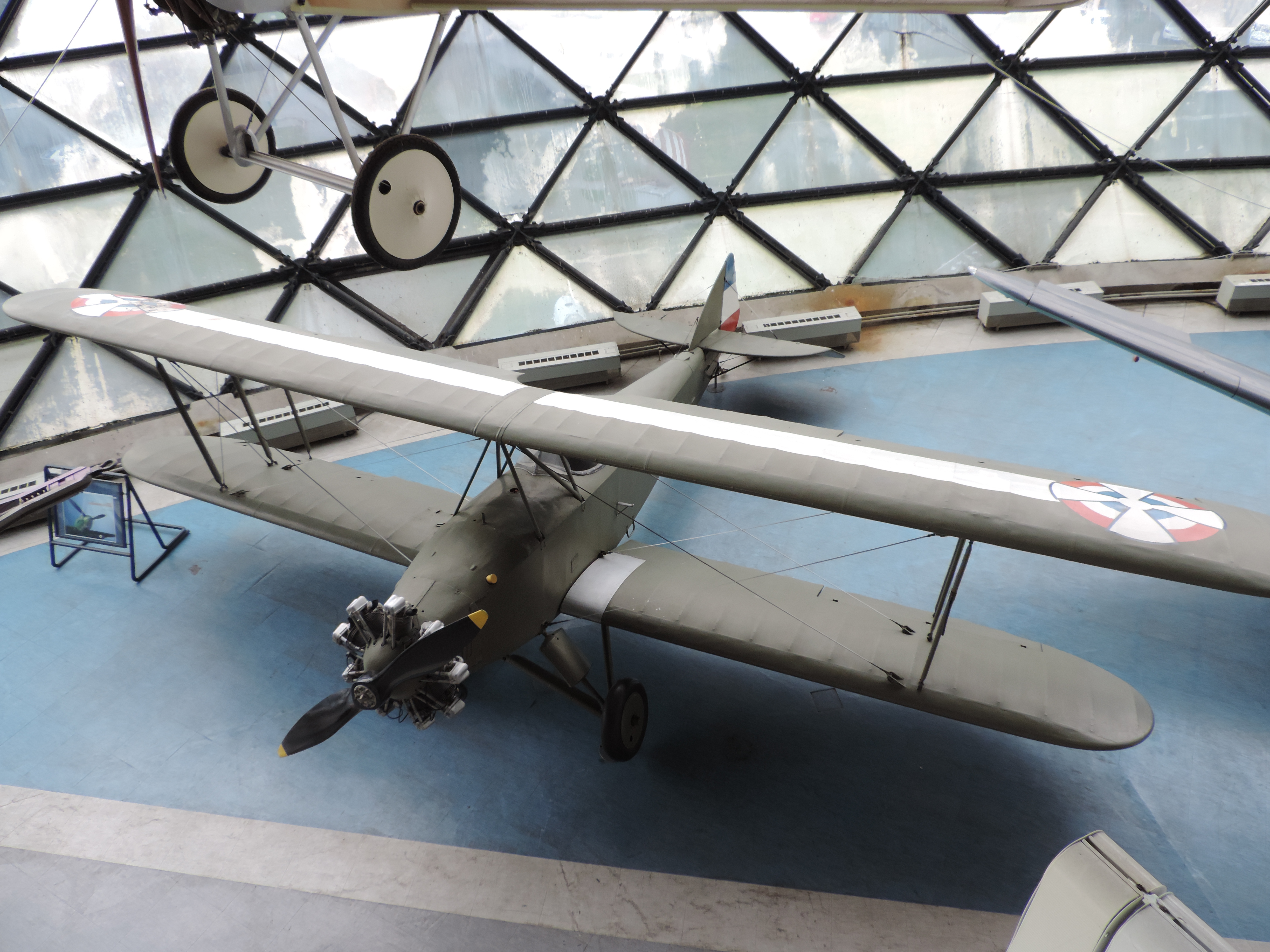 Znaj Fizir FN – Walter im Belgrader Aviation Museum